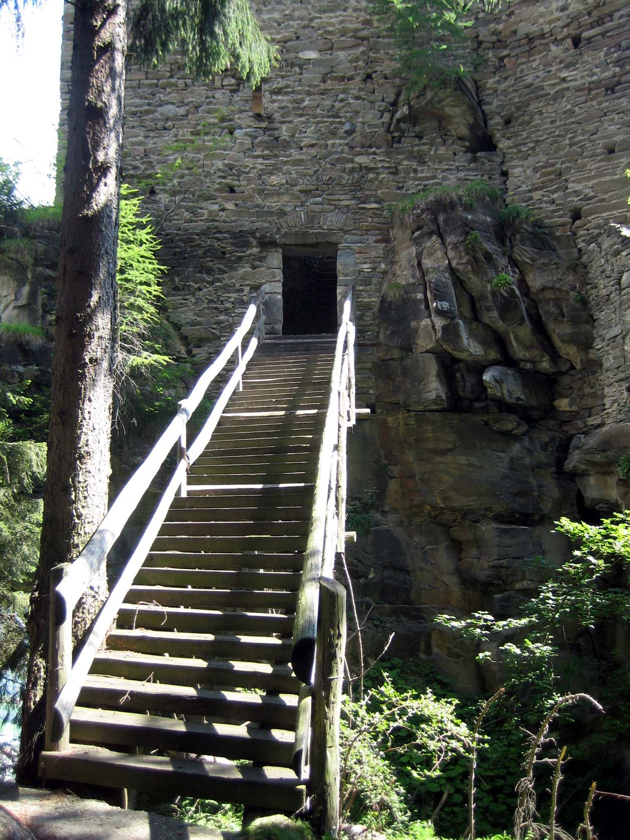 Zugang